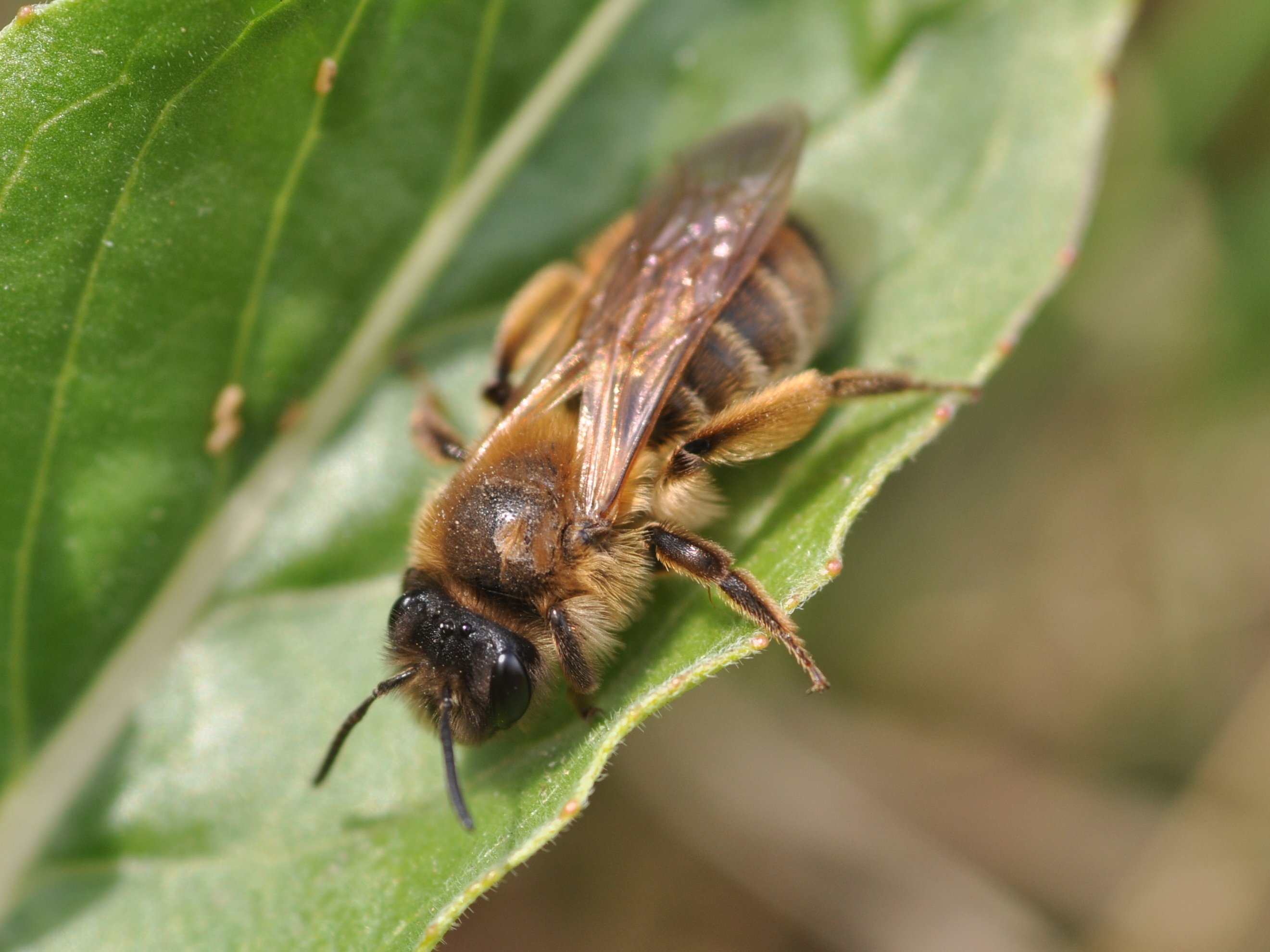 Andrena bimaculata in Bahrenfeld, Hamburg.